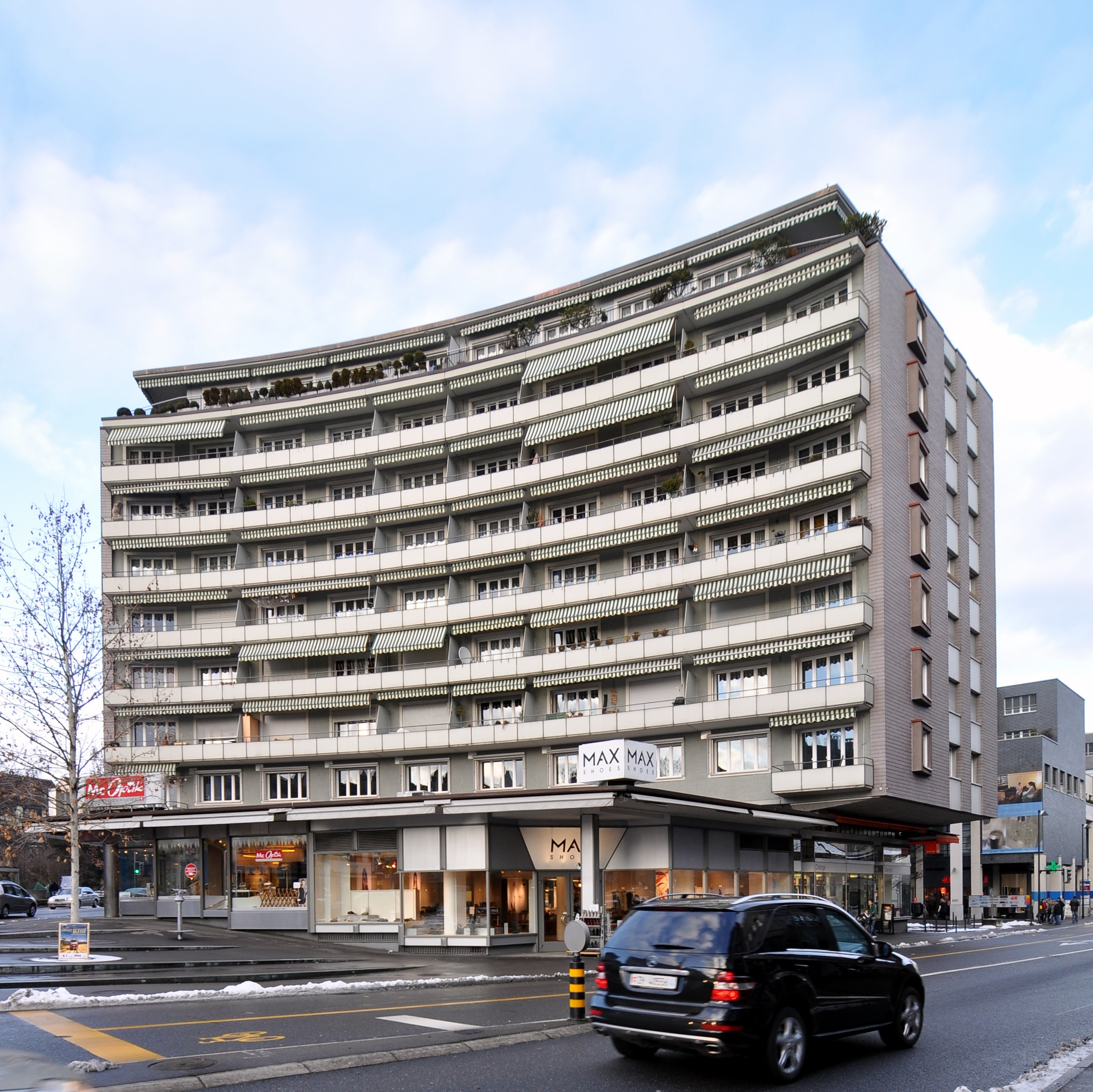 City-Haus, Rapperswil-Jona, 1957, Architekt: Gebrüder Oeschger